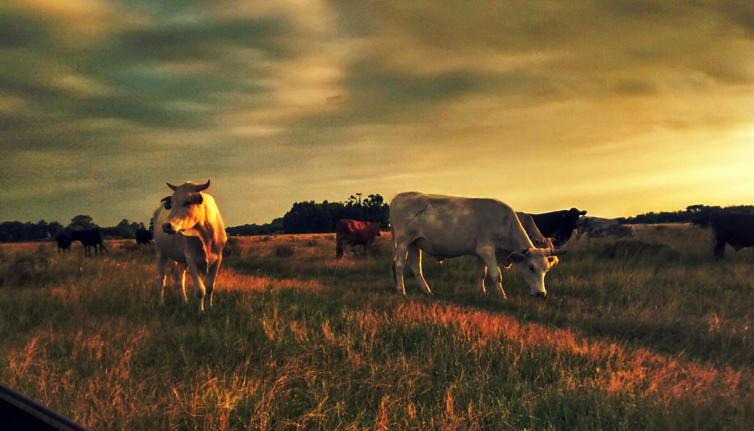 Bovinos no campo